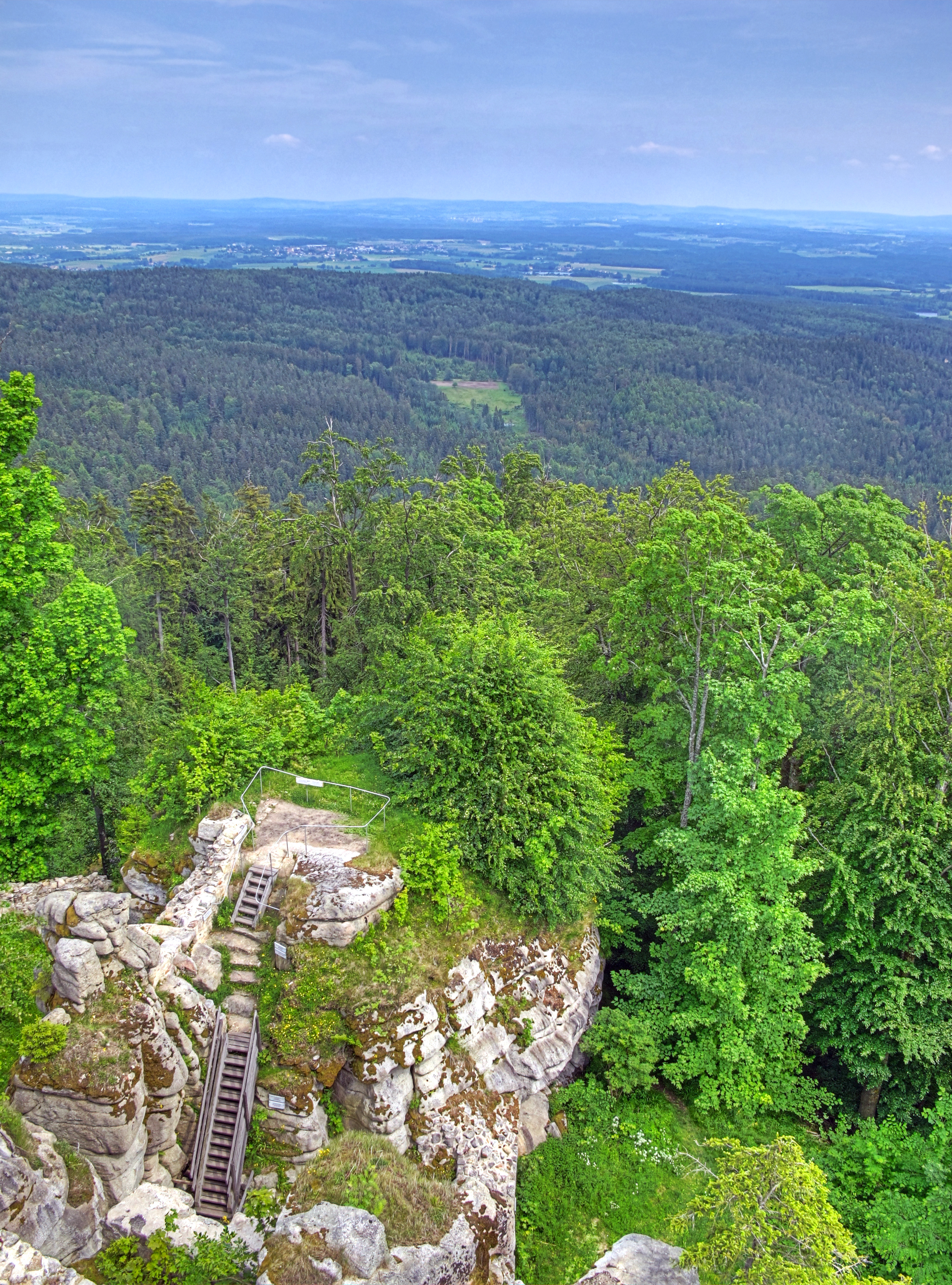 Deutschland, Bayern, Obernpfalz, Landkreis Tirschenreuth, Naturschutzgebiet Steinwald, Burg Weißenstein, Blick vom Burgfried Richtung Osten